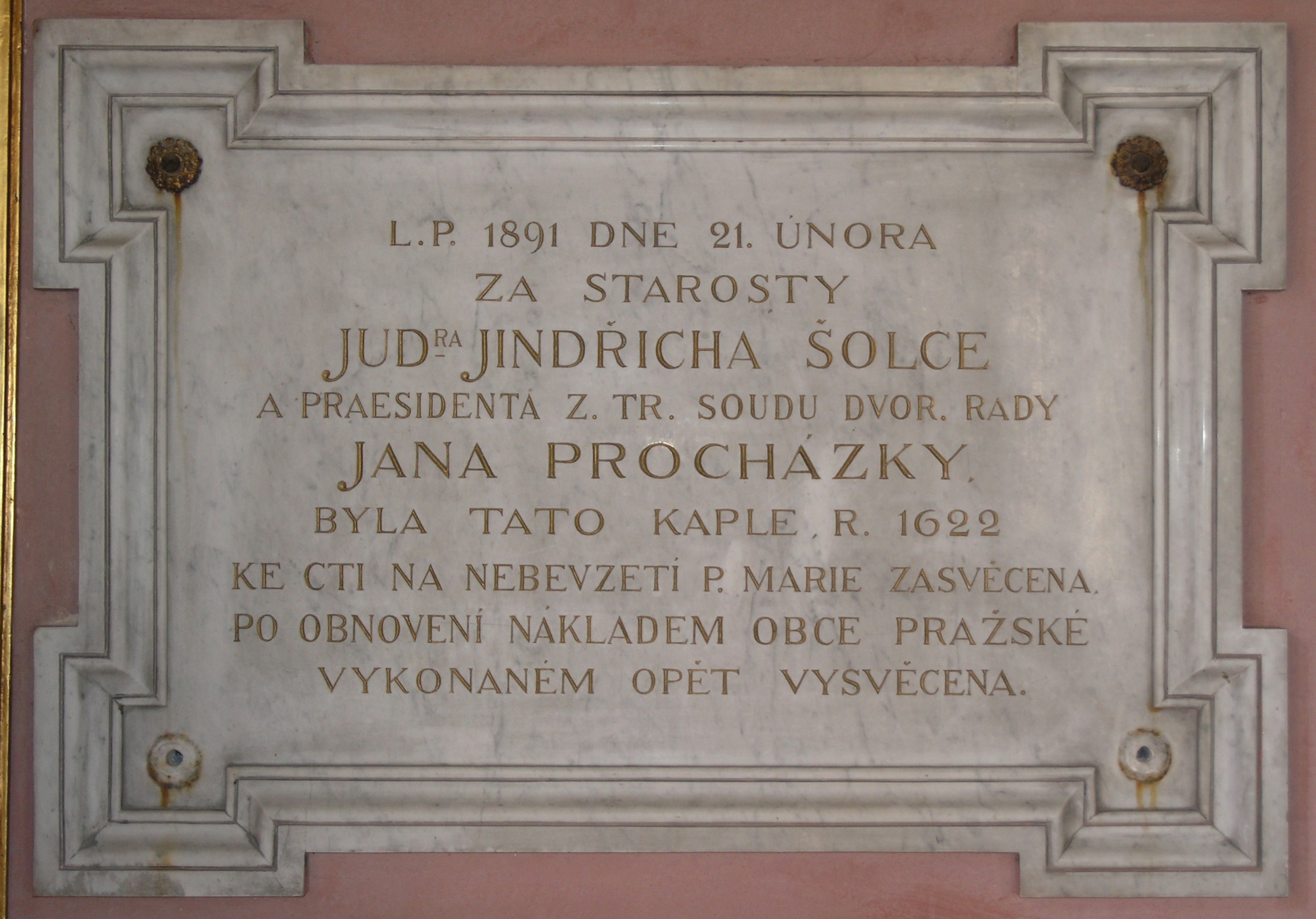 Praha, Novoměstská radnice - pamětní deska v kapli Nanebevzetí Panny Marie